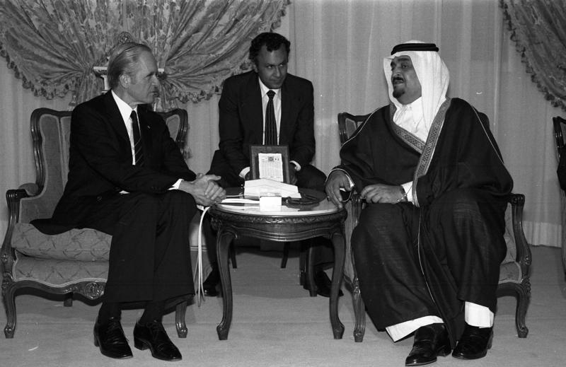 Bundespräsident Carl Carstens macht Kondolenzbesuch bei König Fahd in Saudi-Arabien